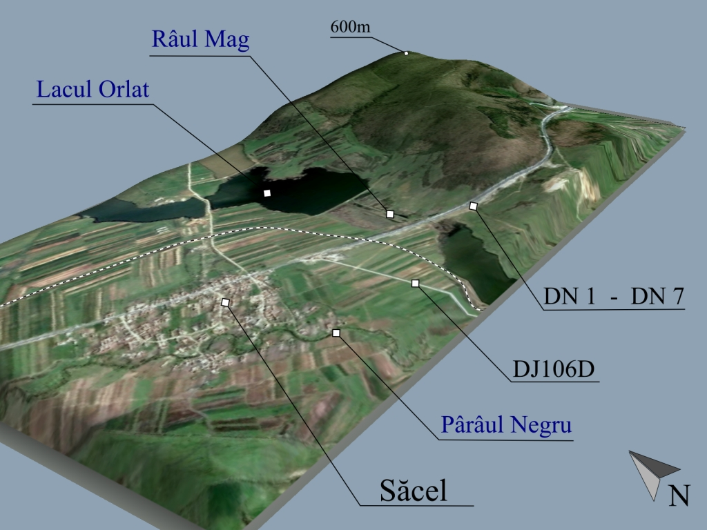 Prelucrare 3D pentru Sacel, Sibiu. Imagine realizata cu date SRTM si textura World Imagery.